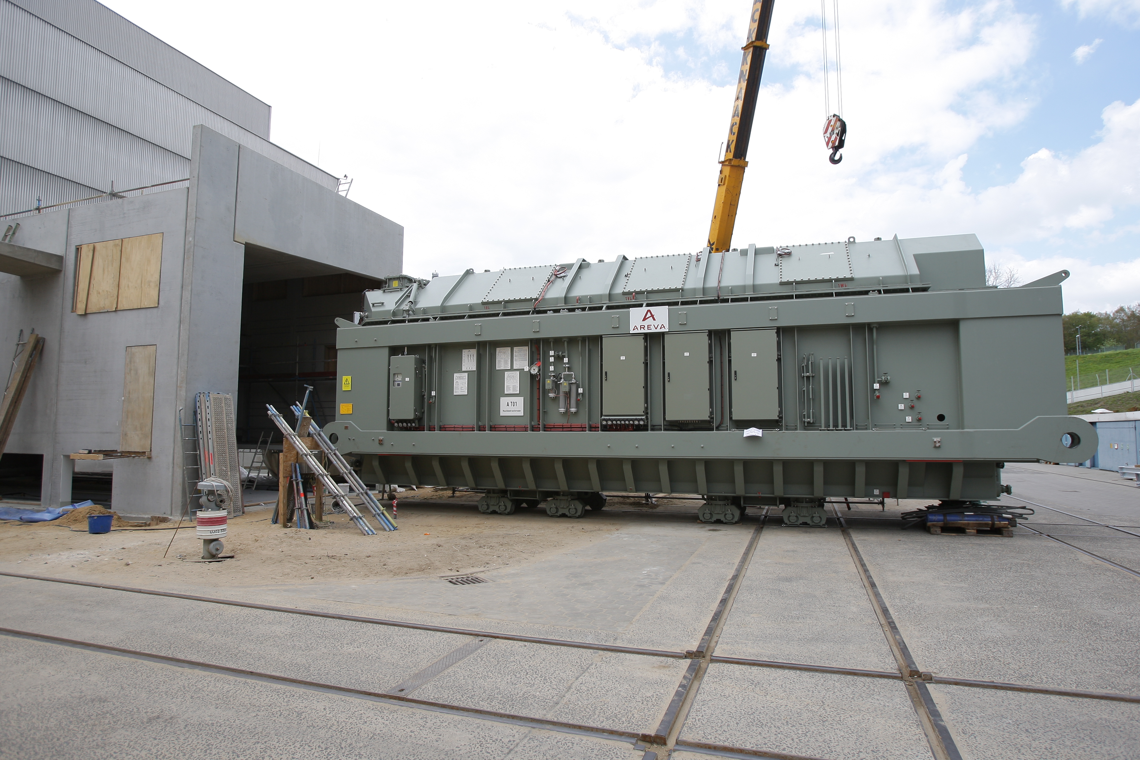 Installation der neuen Trafos im AKW Krümmel.